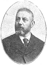 Retrato de Matías Barrio y Mier, publicado en la revista española Nuevo Mundo.